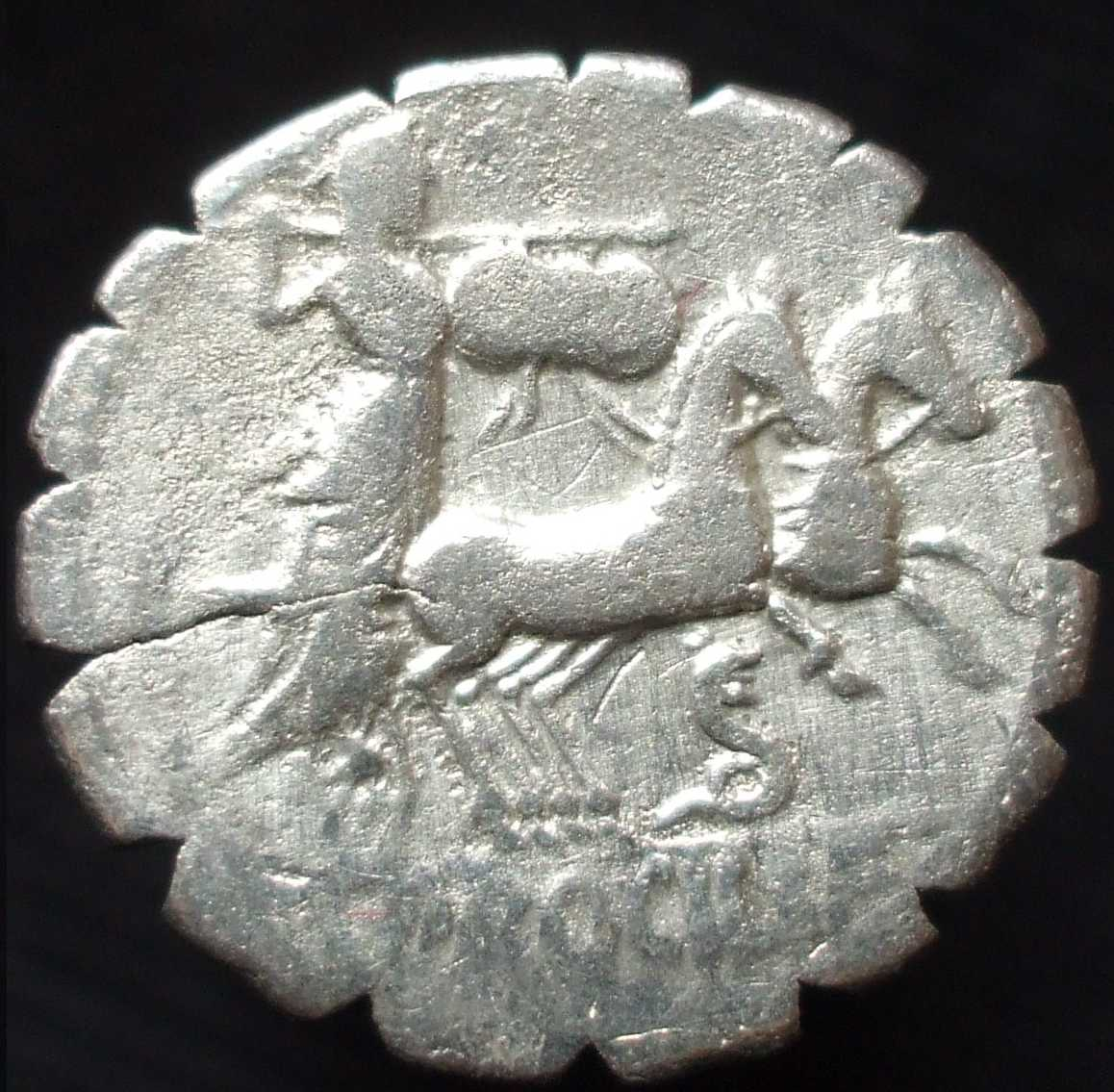 revers d'un denier de a gens Procilia avec Junon Sospita / Juno Iuno Sospita